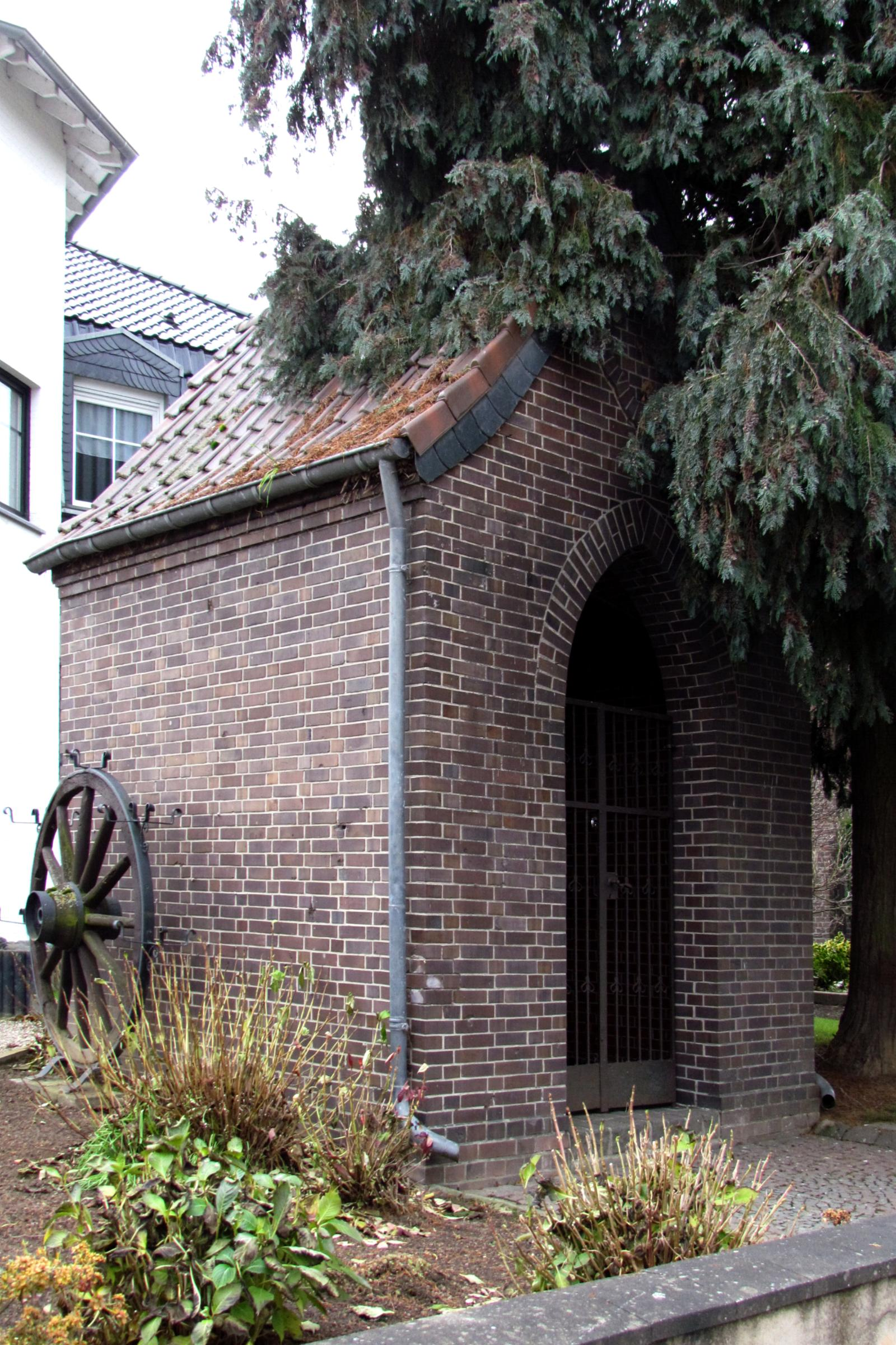 Kirchen und Kapellen in Heinsberg